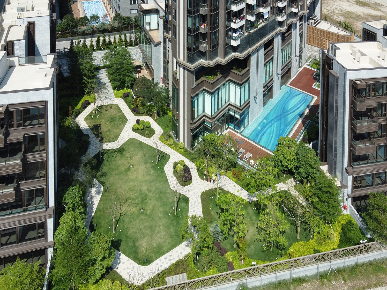 Vibe Centro landscape area